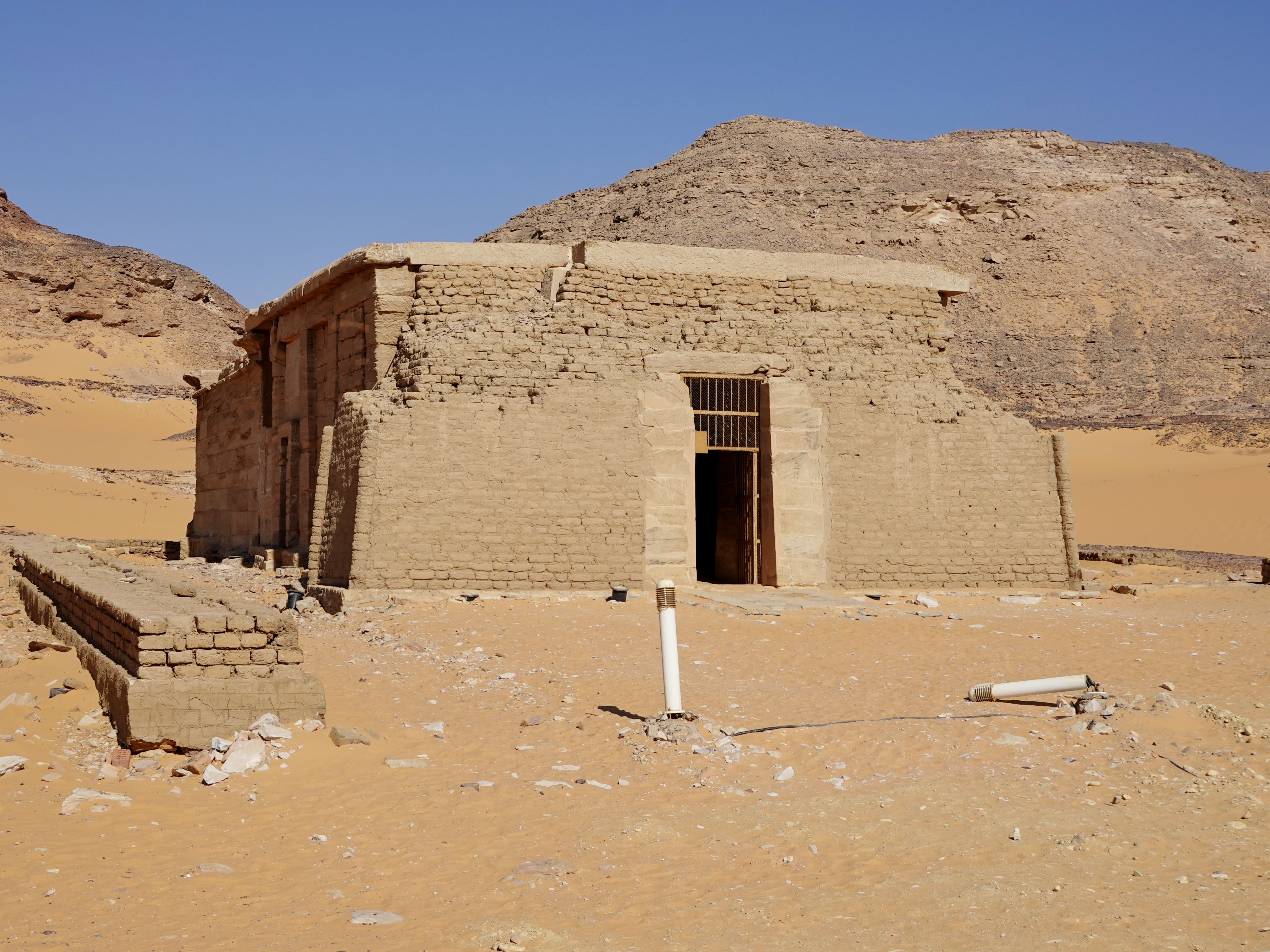 Der versetzte Tempel von Amada am Nassersee, Ägypten